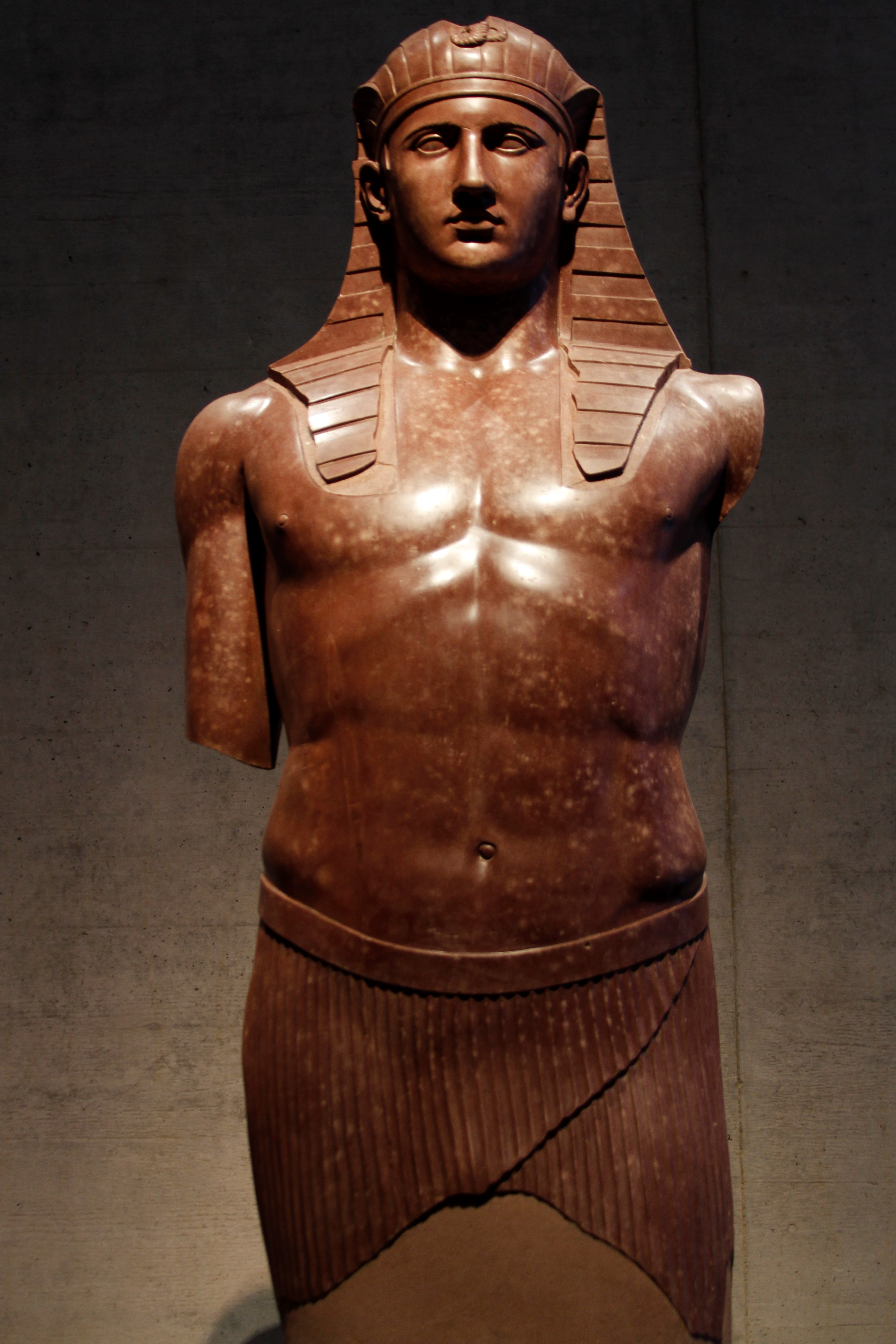 Ägyptisches Museum - Munich - Germany